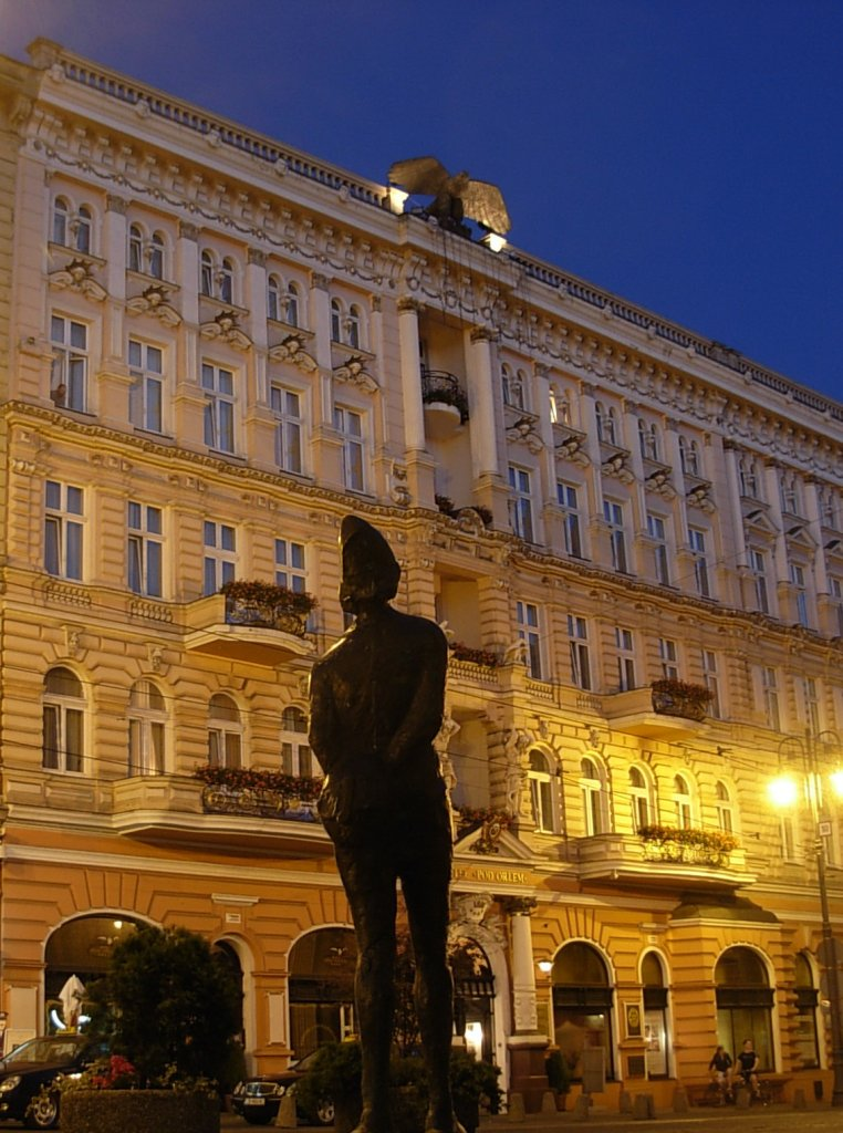 Hotel Pod Orłem